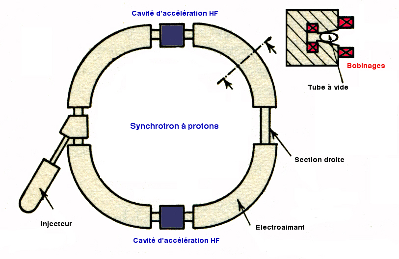 schéma technique du synchrotron à protons